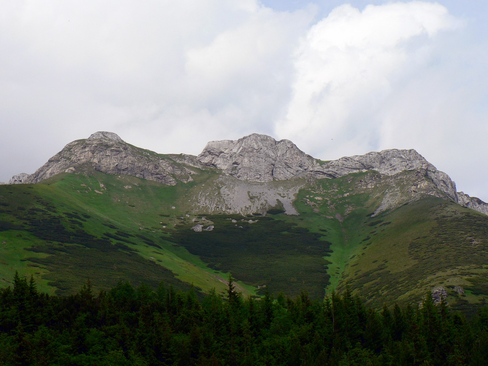 Skrajne Jatki i Golica Bielska ze szlaku Doliną Kieżmarską